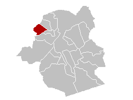 Gemeentekaart Sint-Agatha-Berchem